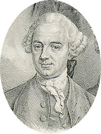 Peter Jonas Bergius (1730-1790)